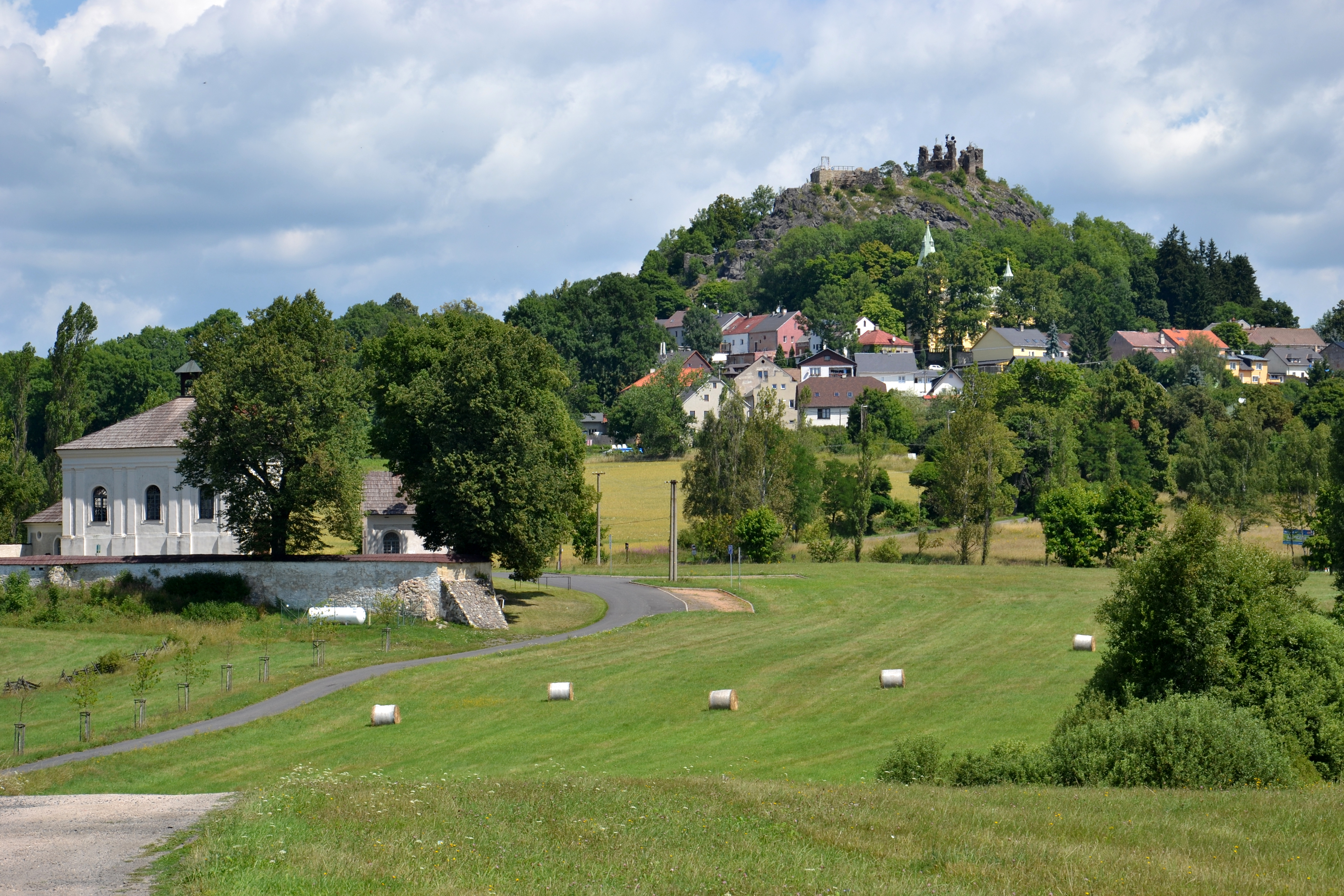 Andělská Hora – celkový pohled na jižní část vesnice se zříceninou hradu